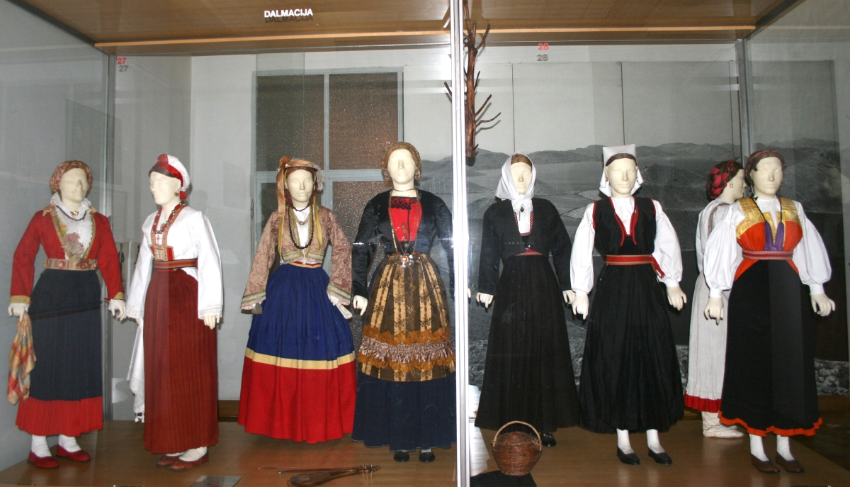 snimljeno tijekom Noći muzeja u Etnografskom muzeju u Zagrebu